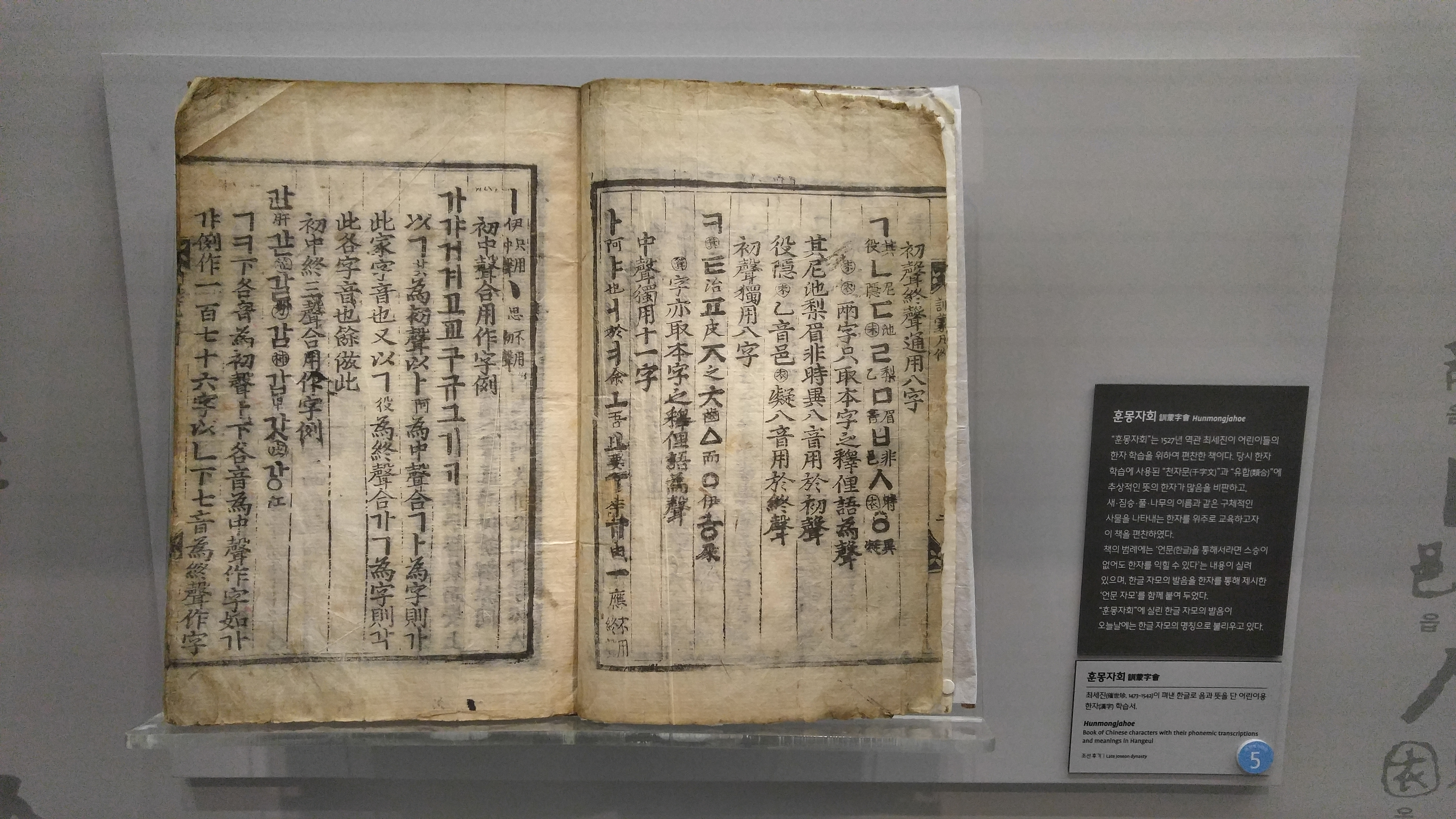 훈몽자회(1)